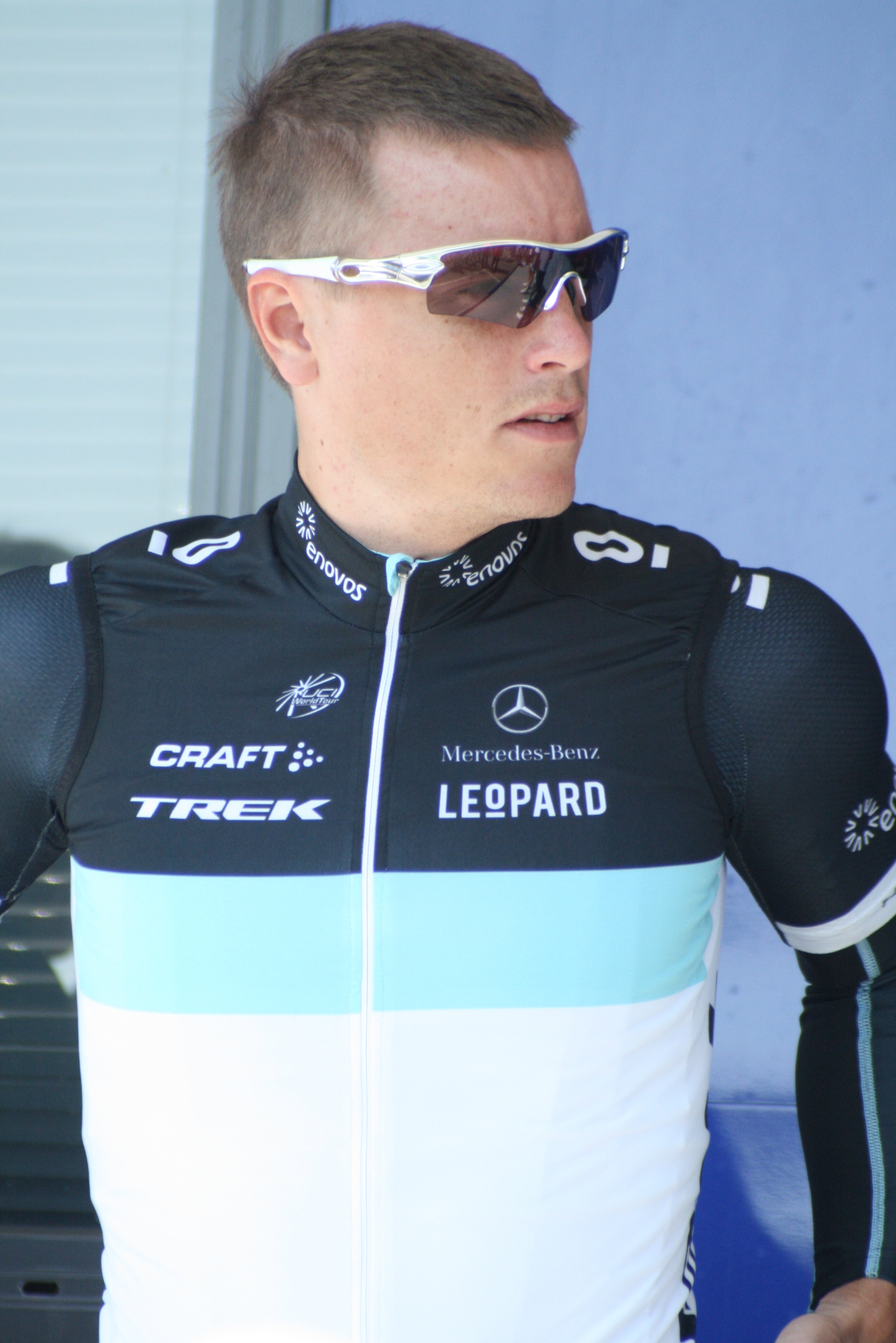 Présentation des coureurs au départ de la première étape Martin Pedersen